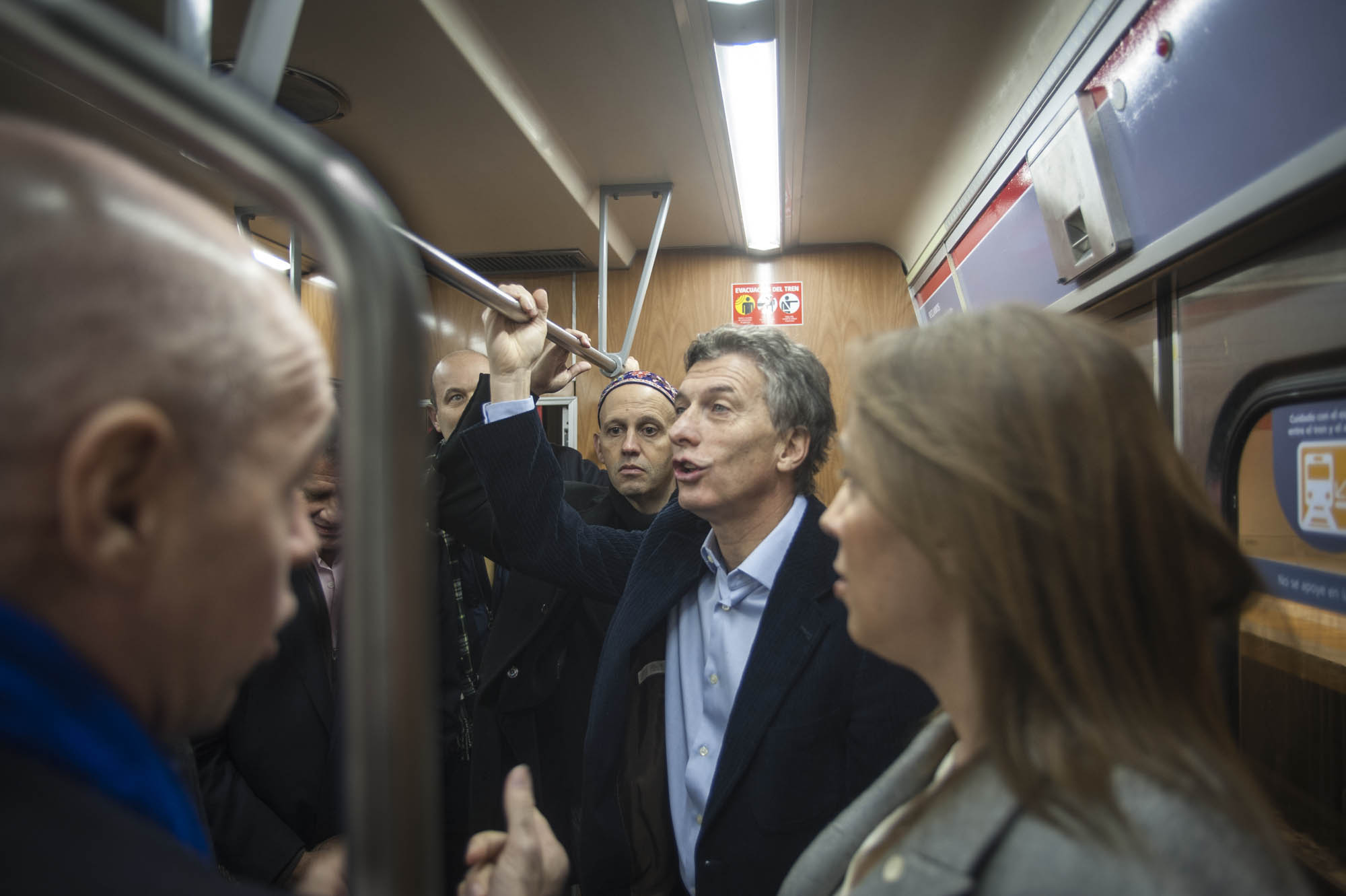 Buenos Aires. Julio 26 de 2013. El jefe de Gobierno de la Ciudad de Buenos Aires, Mauricio Macri, inauguró hoy las estaciones de subterráneos de la línea B Echeverría y J.M. de Rosas. Foto Tony Valdez/GCBA.